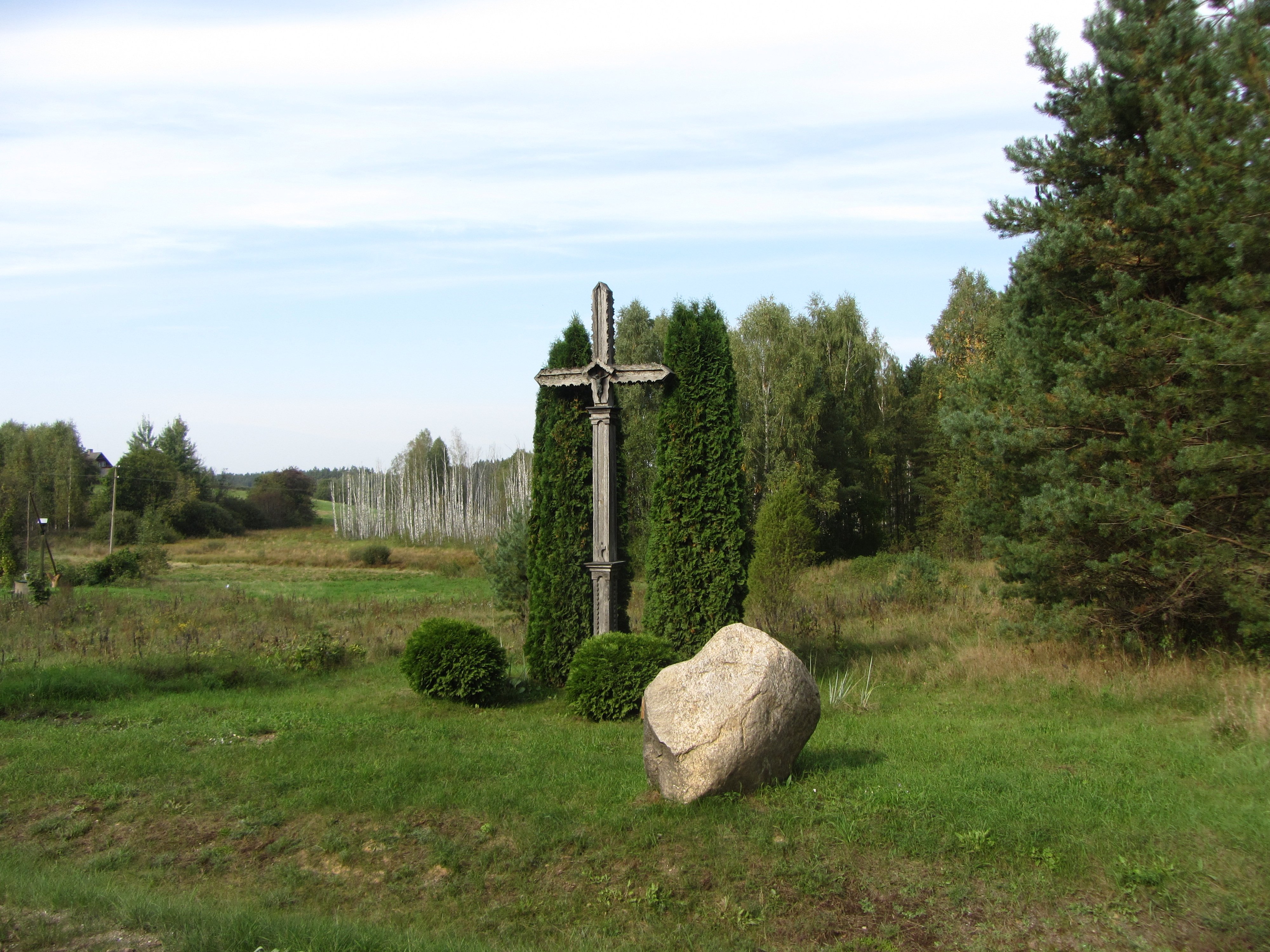 Šnieriškės 33207, Lithuania